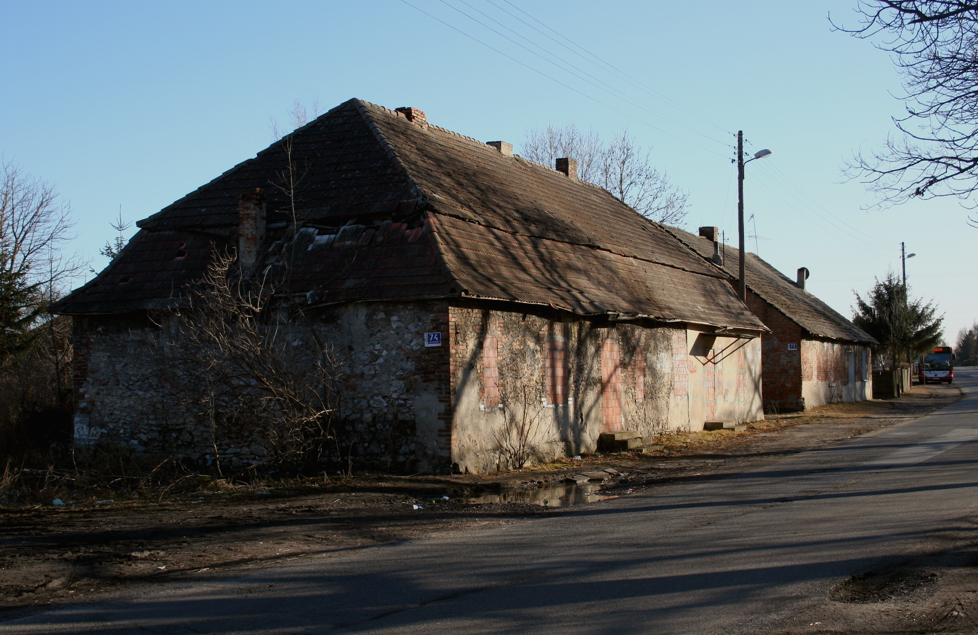 Częstochowa, Rząsawy - ul. Meliorantów